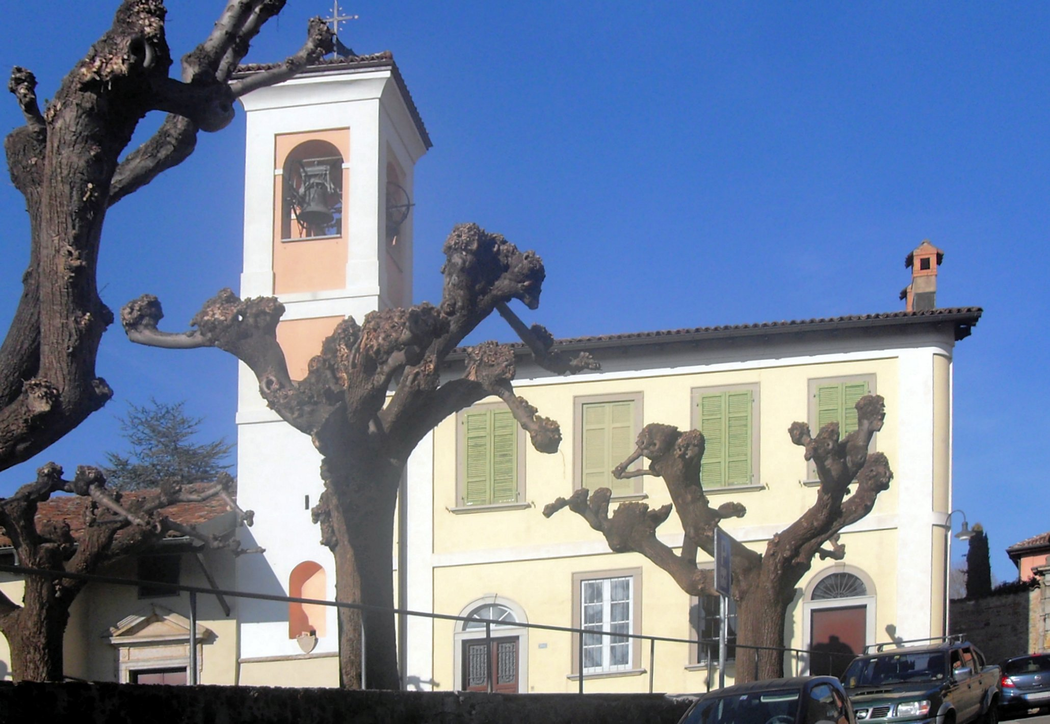 La chiesa dei San Pietro e Lucia a Stabio, Ticino, Svizzera